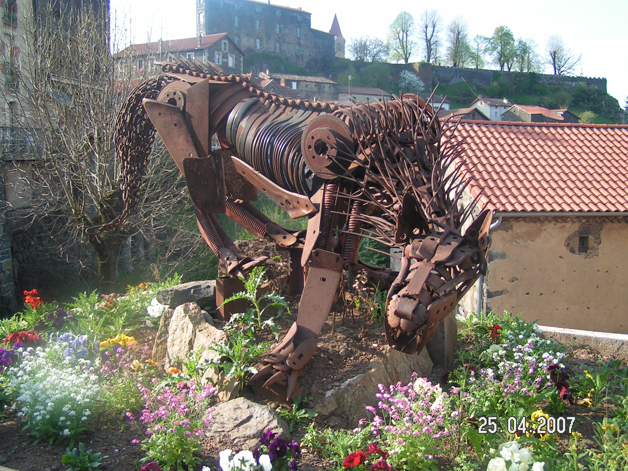 Représentation de la bête du Gévaudan à Saint-Privat-d'Allier